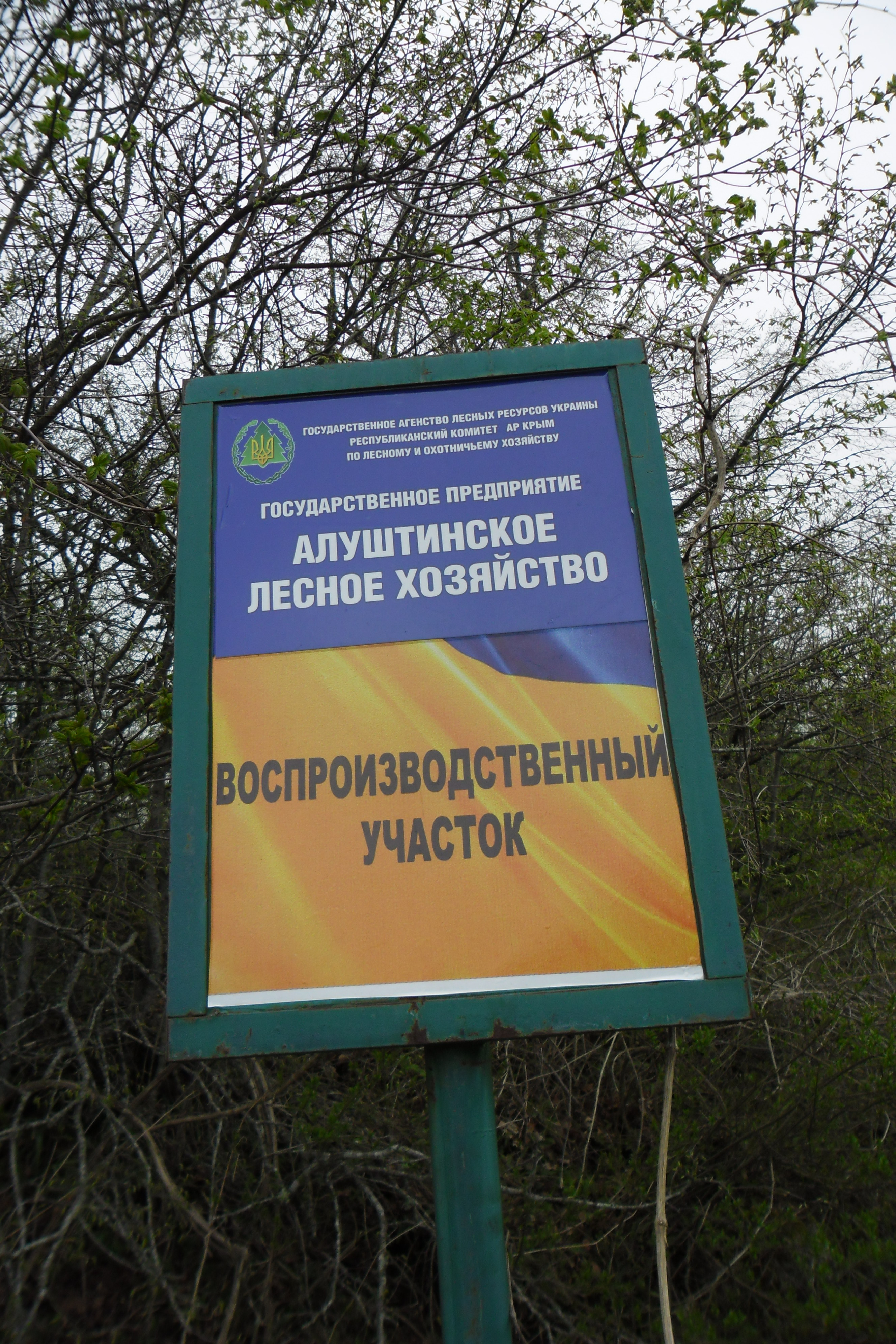 Фото